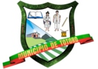 Escudo del Municipio de Totoró, Cauca